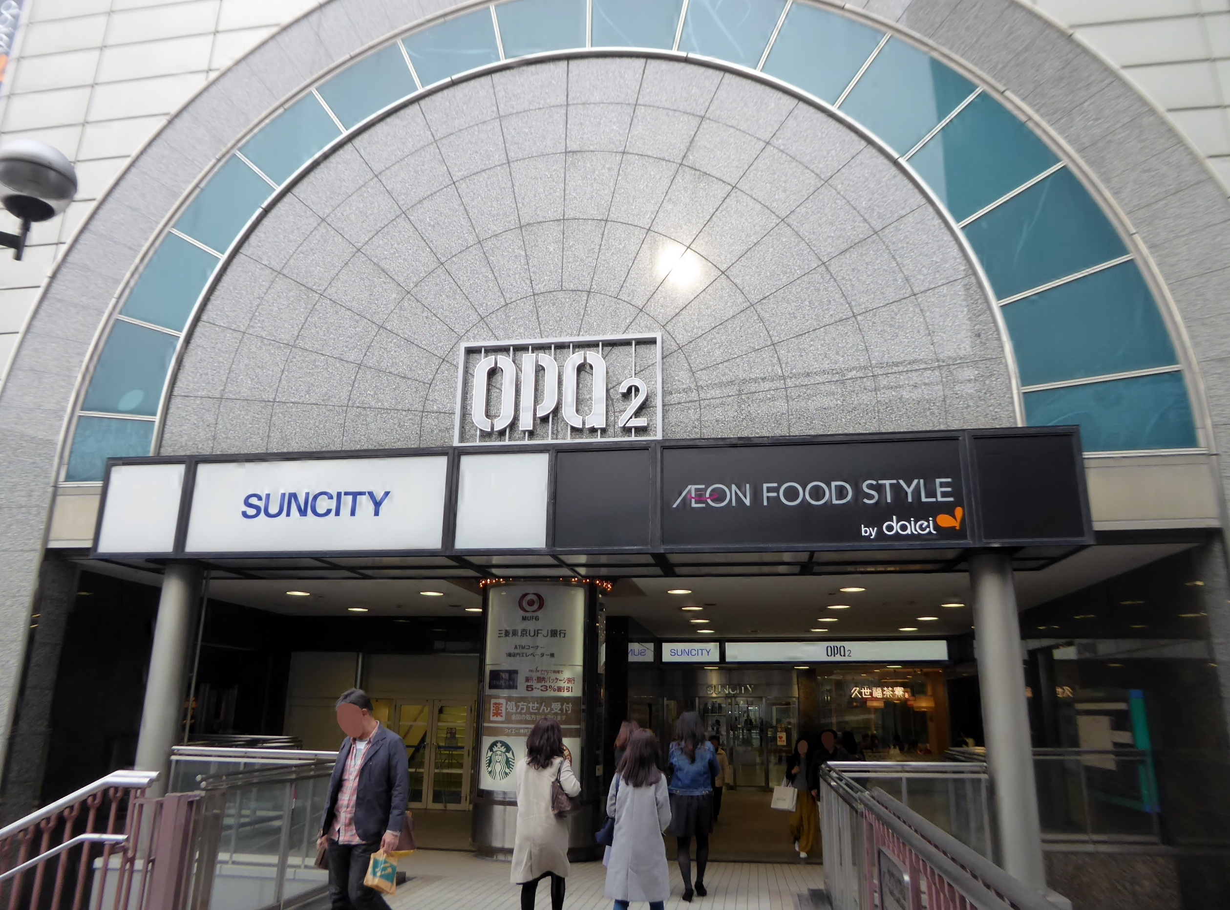 ダイエー神戸三宮店2階出入口を撮影。